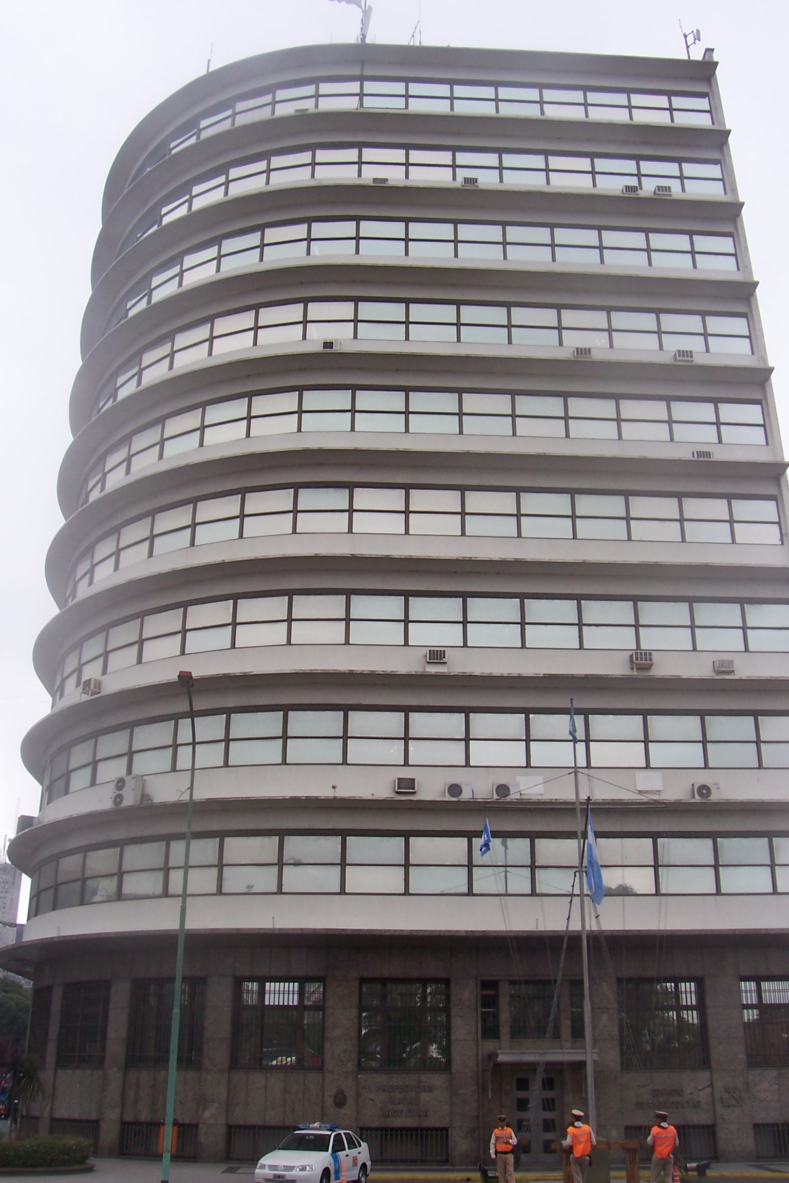 El edificio "Guardacostas", sede central de la Prefectura Naval Argentina, en el barrio de Puerto Madero, Buenos Aires.